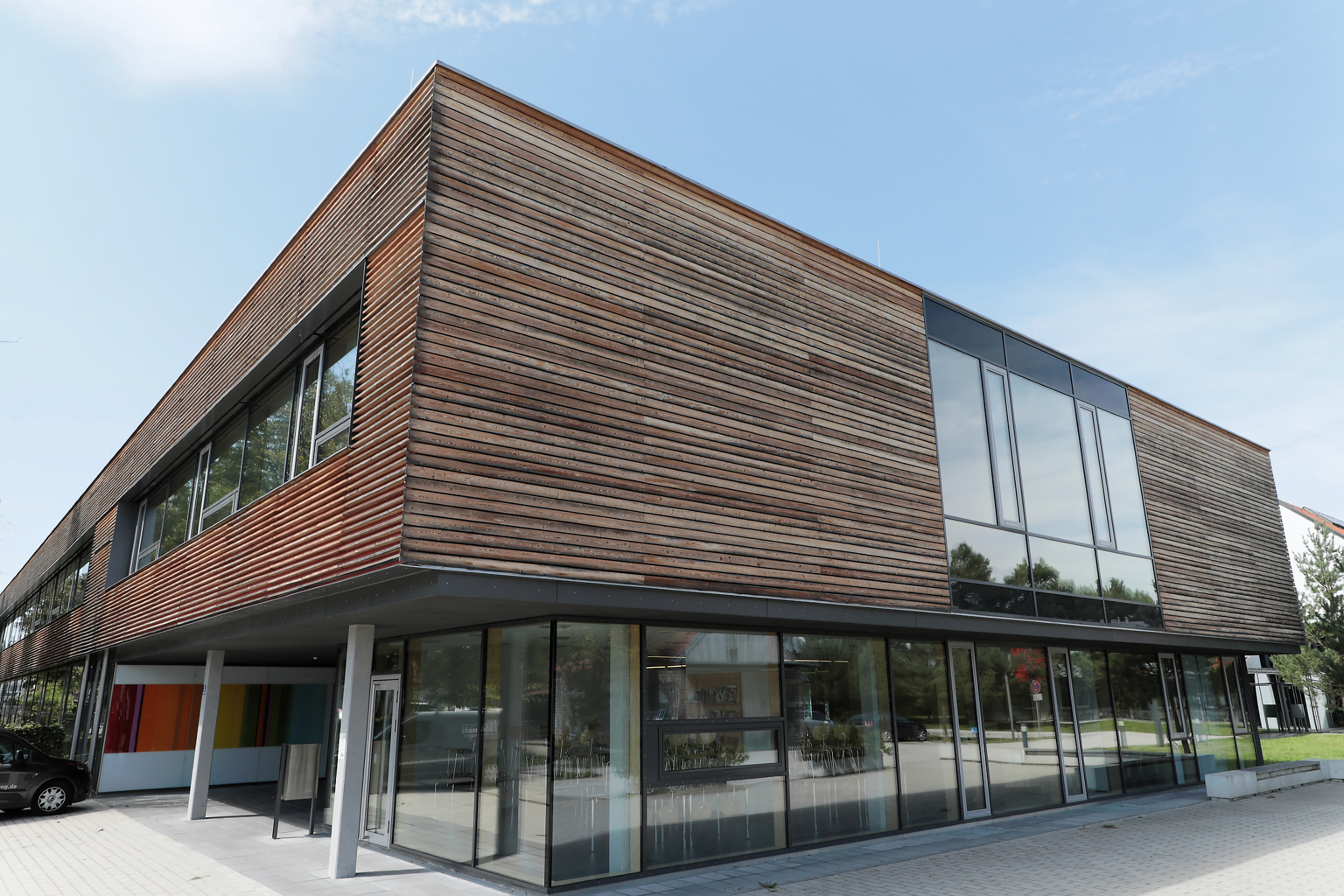 Schulgebäude